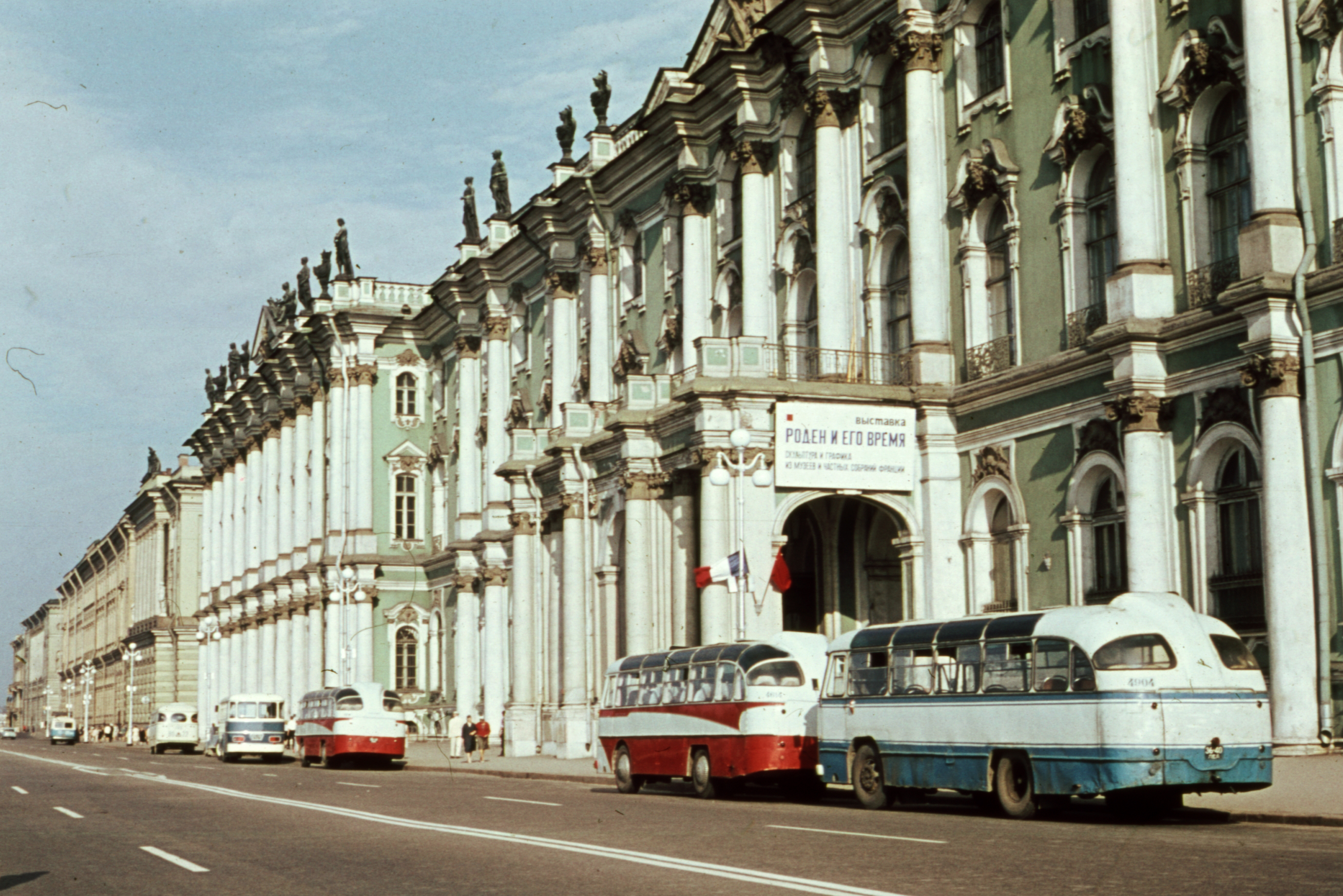 (Leningrád) Ermitázs. Location: Russia, St. Petersburg Tags: LAZ-brand, Soviet brand, colorful, Soviet Union, Cyrillic alphabet Title: (Leningrád) Ermitázs.